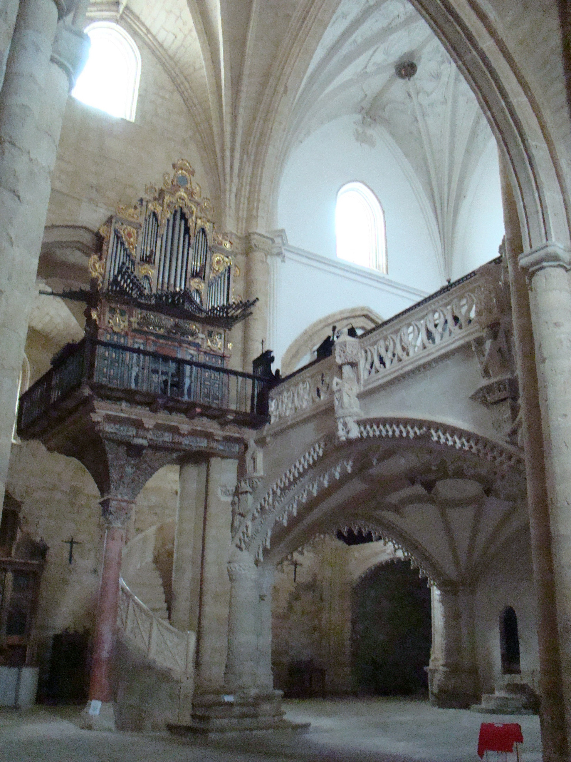 Iglesia de San Hipólito en Támara de Campos (Palencia, España). Vista del sotocoro, coro alto y órgano.